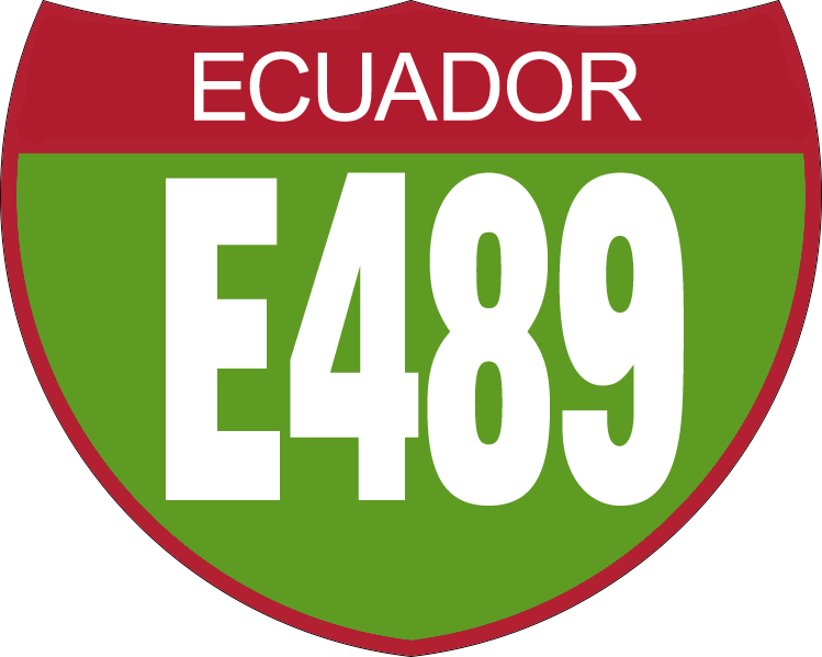 Disco de Identificación Ruta E489